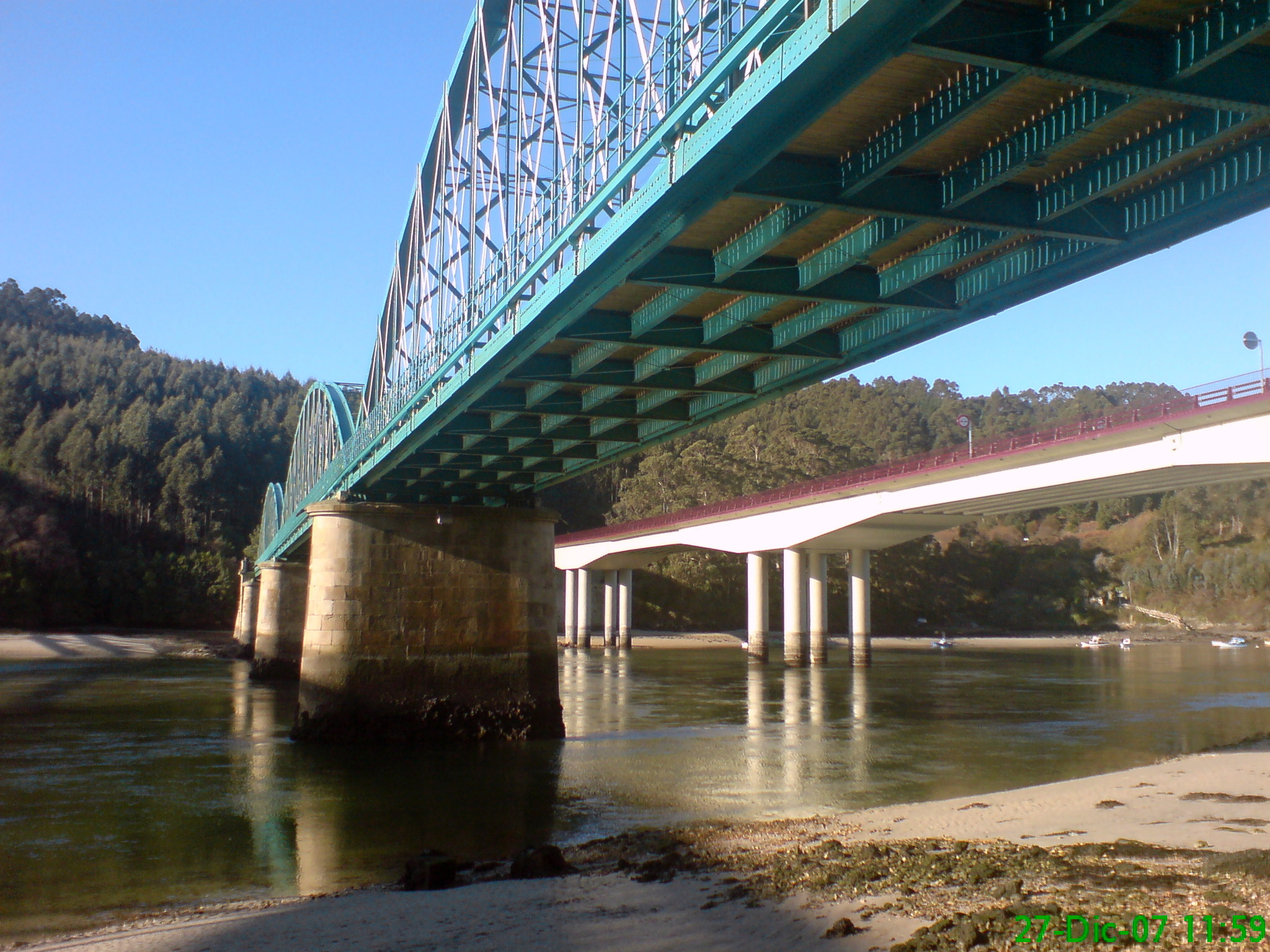 Pontes vella e nova na ria_barqueiro Categoría:Imaxes de Mogor Categoría:Imaxes do Vicedo Mañón Vicedo, O